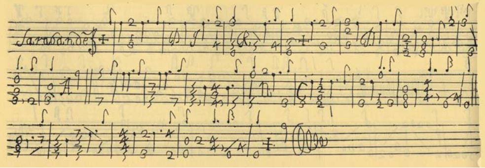 A piece from A M Bartolotti's Secondo libro, Rome, 1655.